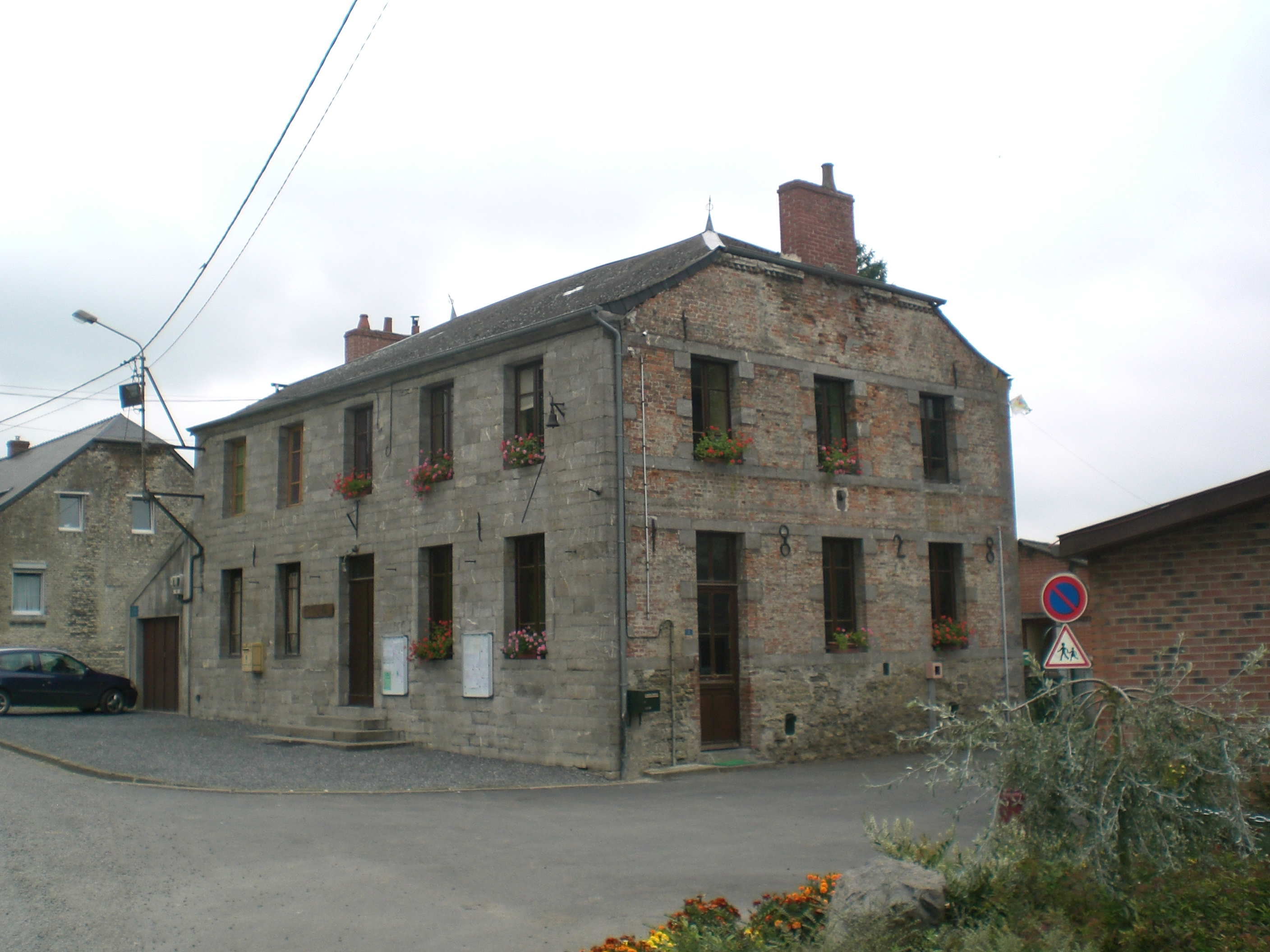 mairie de Rainsars nord france